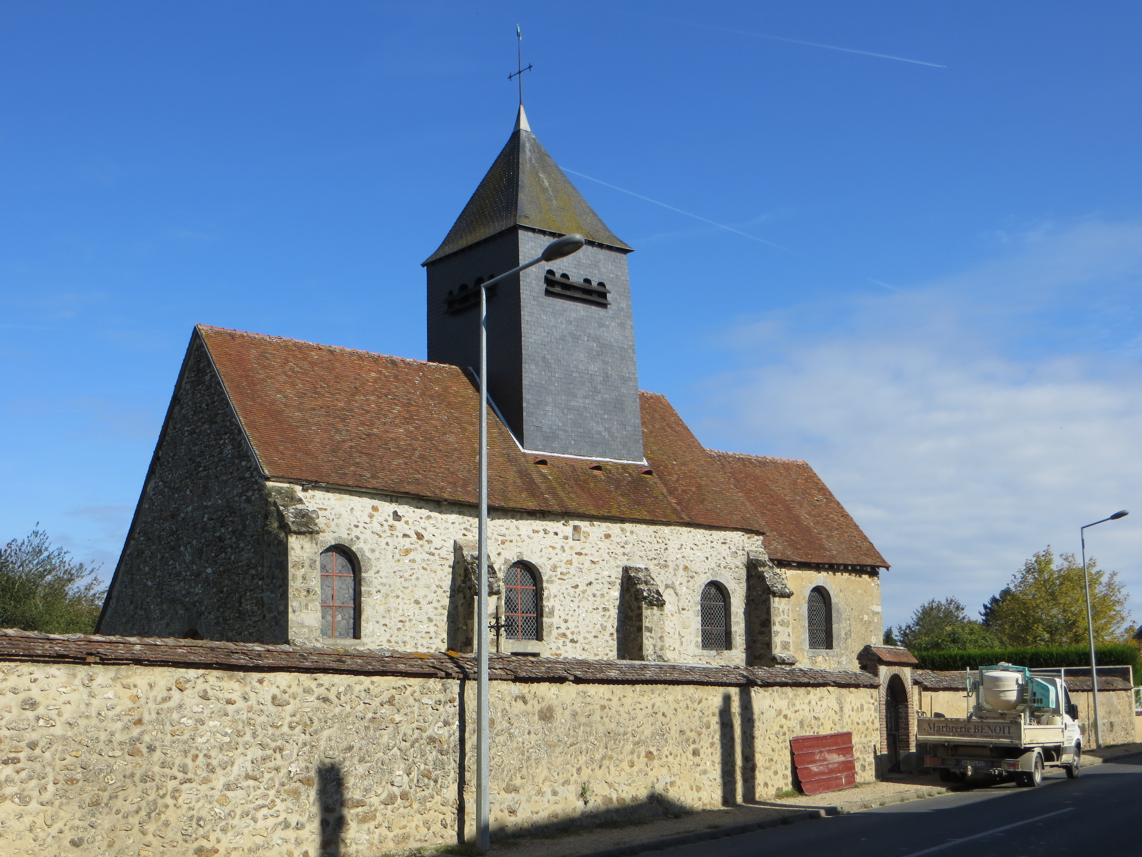 Vue générale de l'église